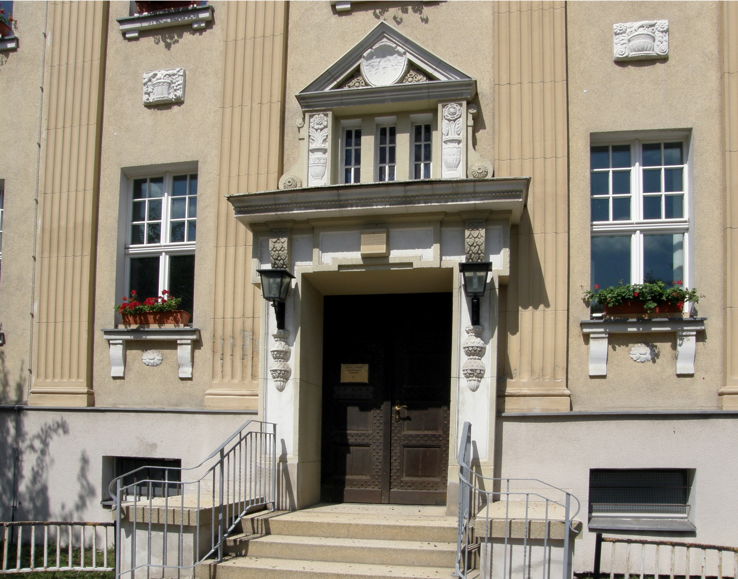 Falkensee, Falkenhagener Straße, Rathaus; Baudenkmal